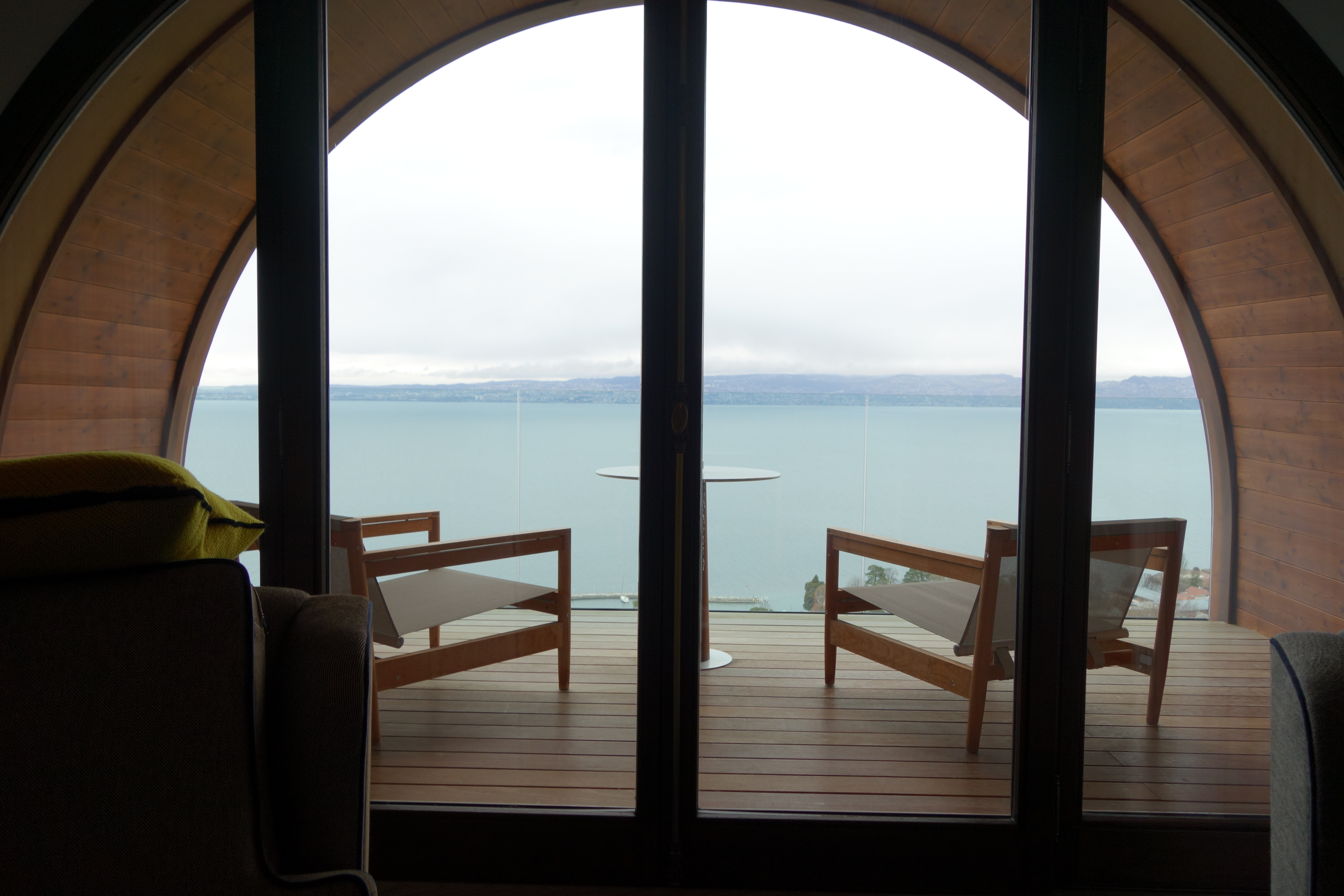 Vue sur le Léman